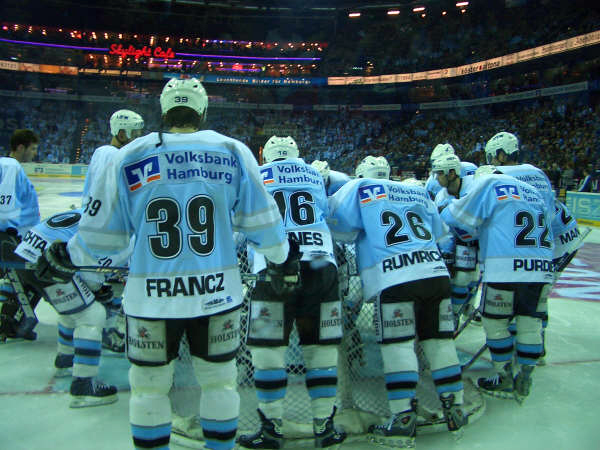 Bildbeschreibung: Ein selbstgeschossenes Foto .. das während dem Spiel Hamburg gegen Frankfurt gemacht wurde. Quelle:selbst fotografiert ...Ort: Color Line Arena Fotograf/Zeichner:FamilienZugehöriger von User Eishamburger Datum: ...??????? Sonstiges: .../